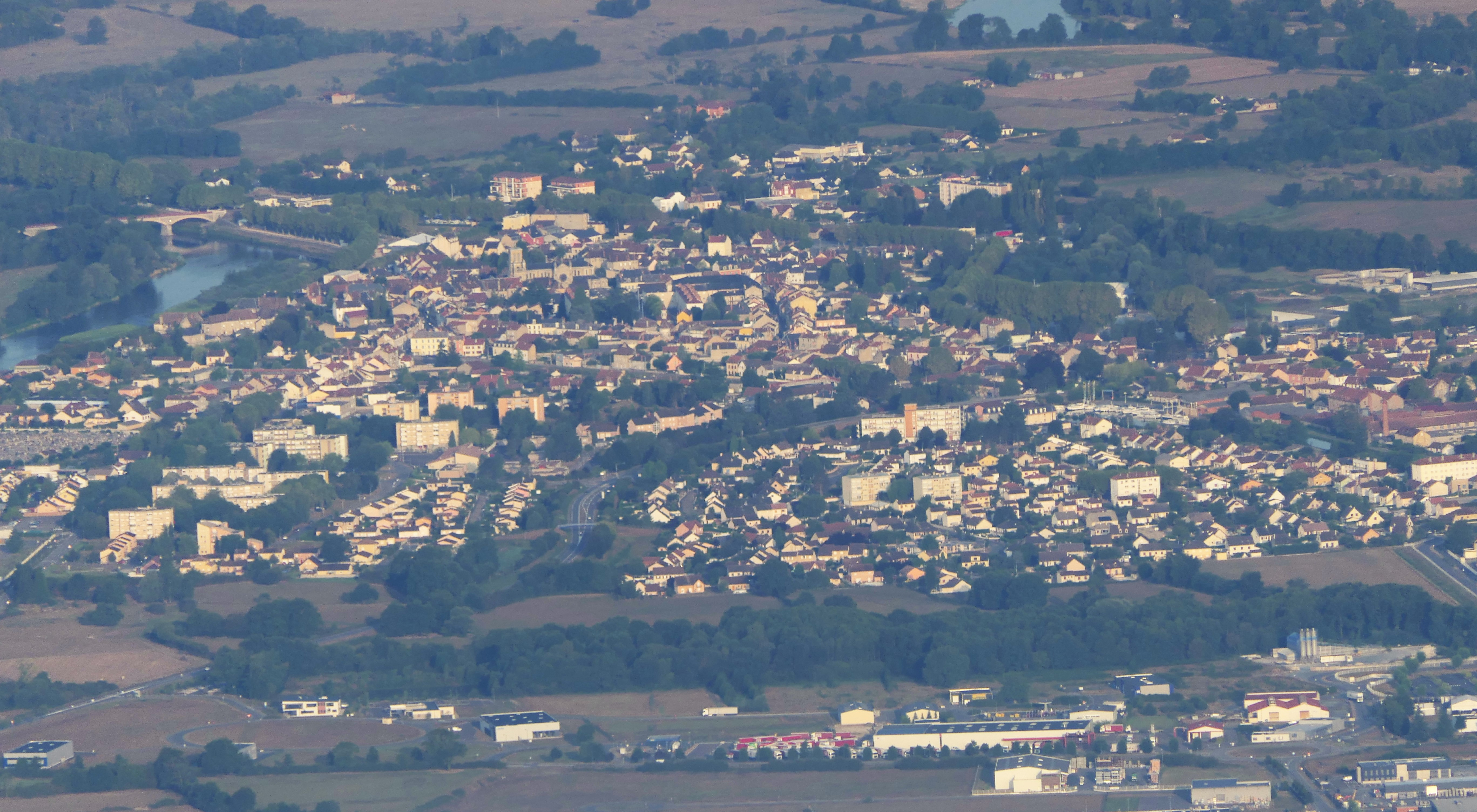 Digoin, vue aérienne